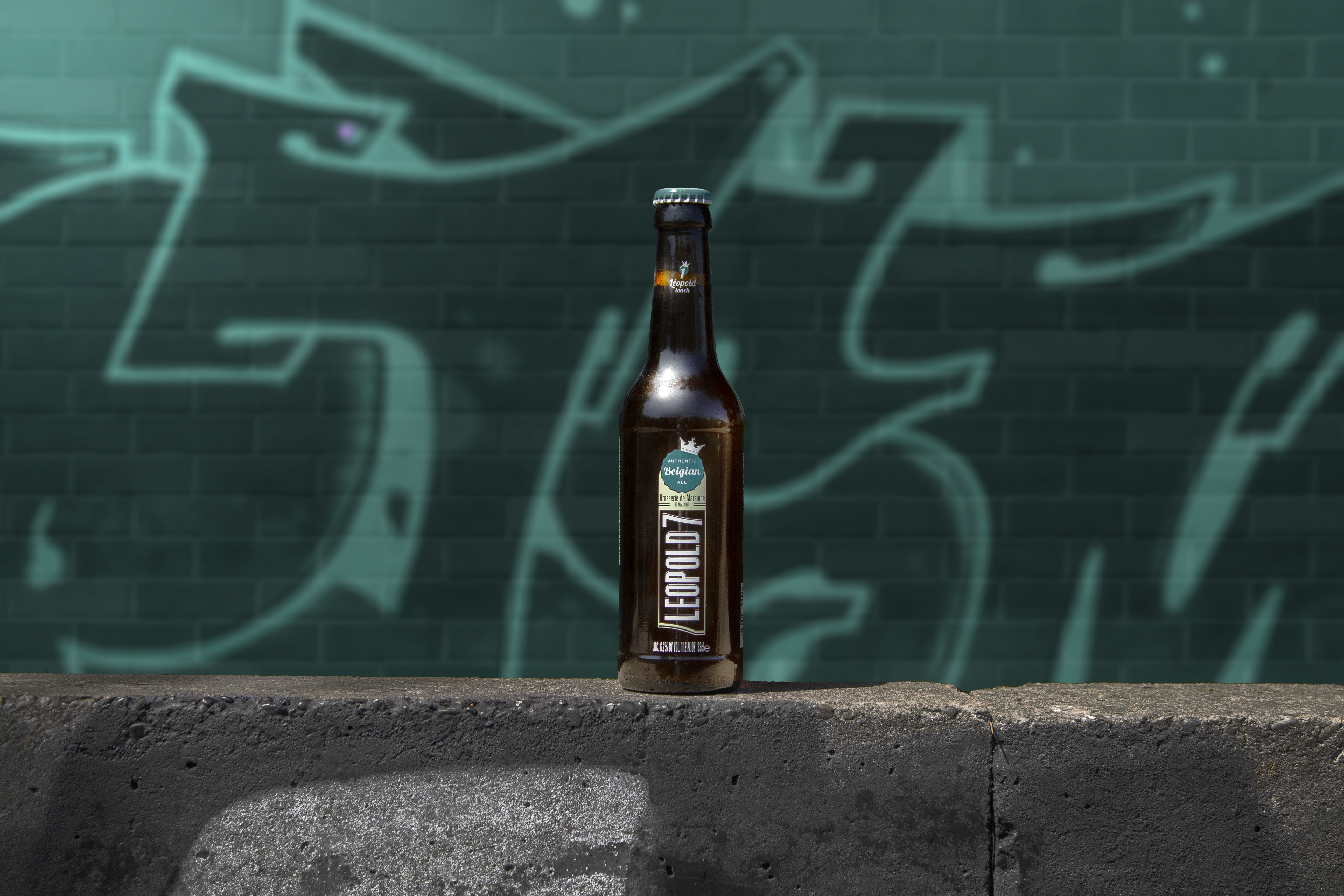 La bière spéciale et artisanale de référence de la Brasserie Léopold 7